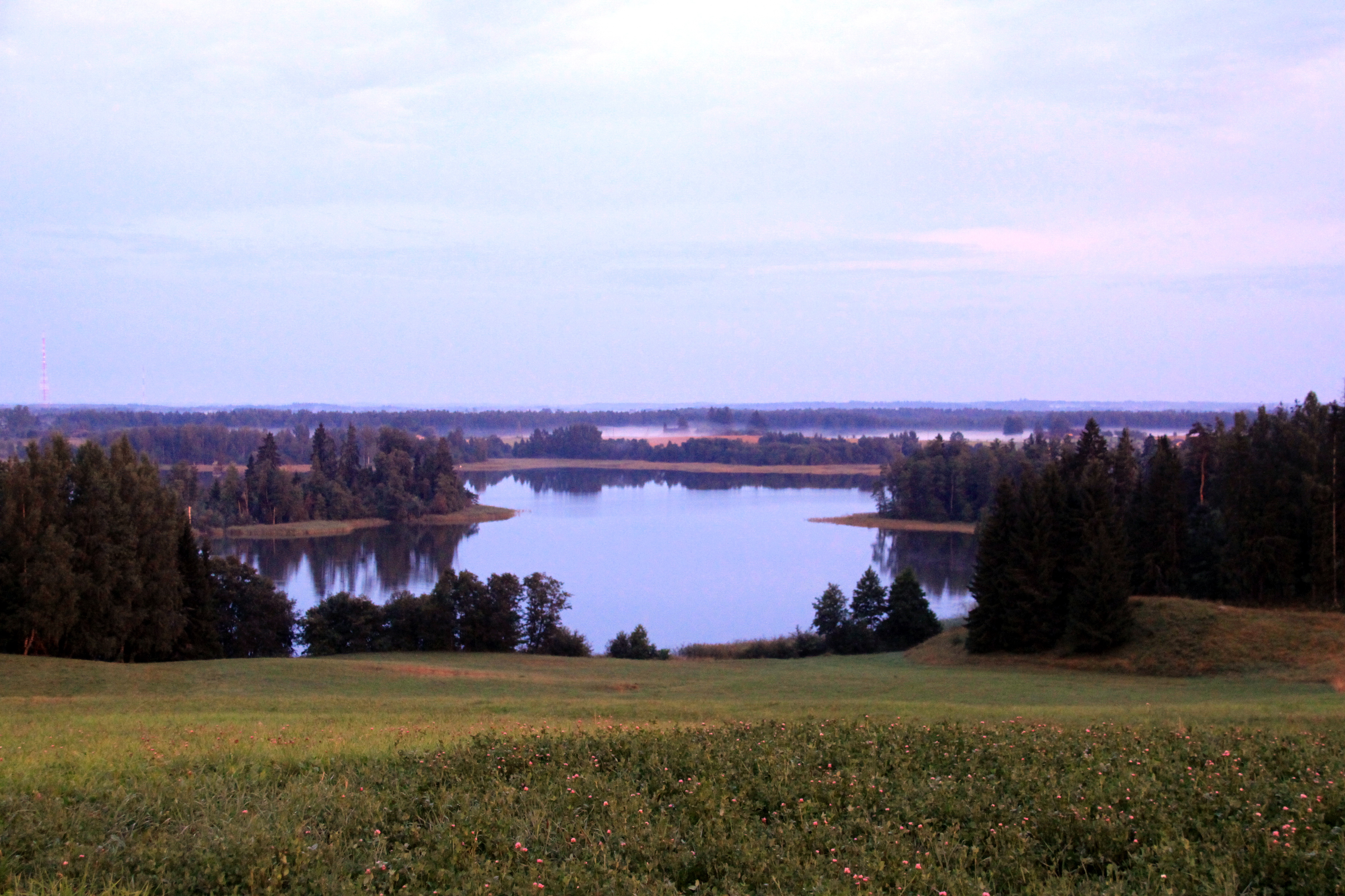 Adamovas ezers